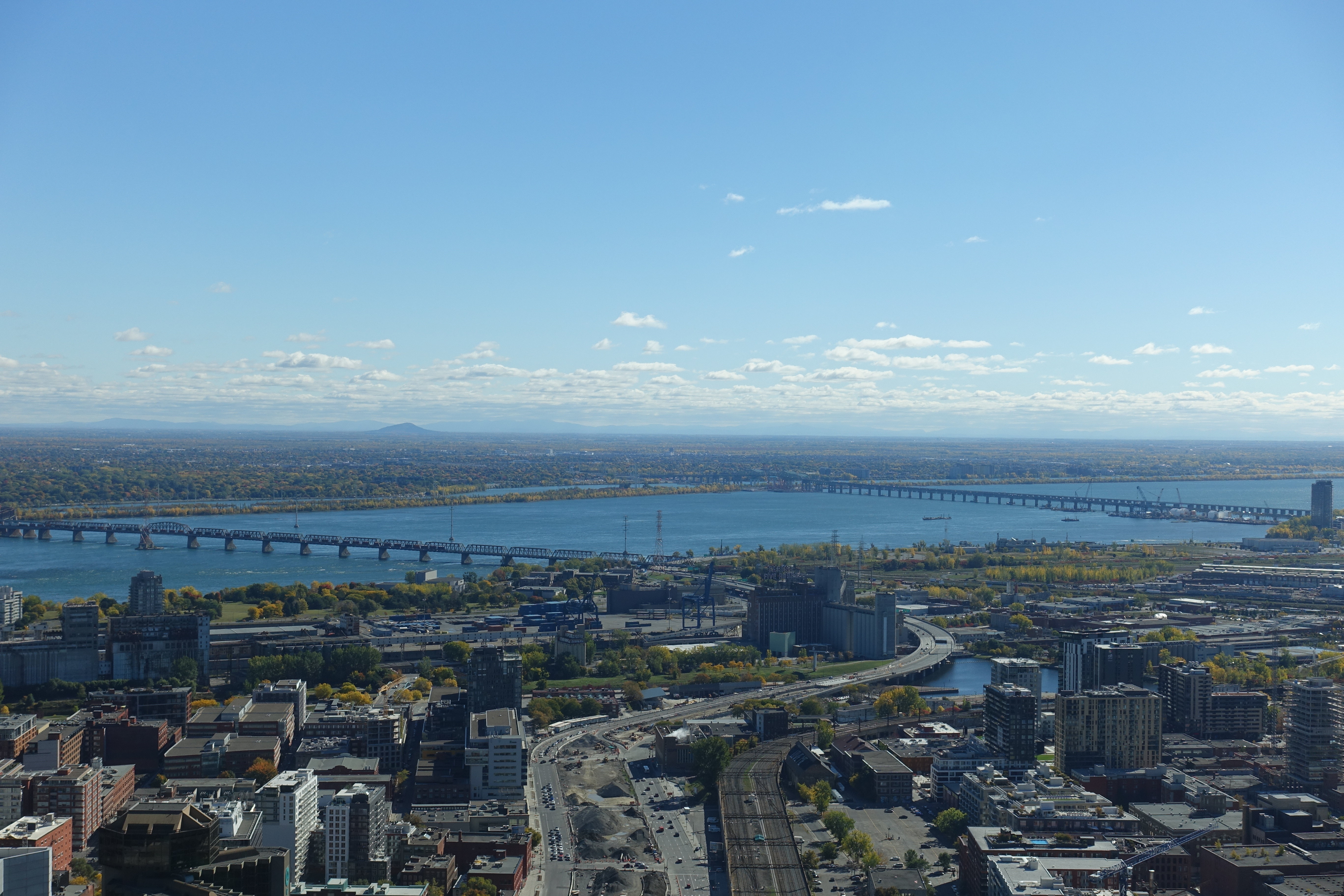 Saint-Laurent @ Observatory @ Au Sommet Place Ville-Marie @ Montreal